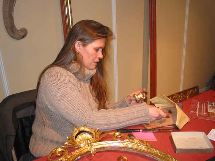 La doreuse.